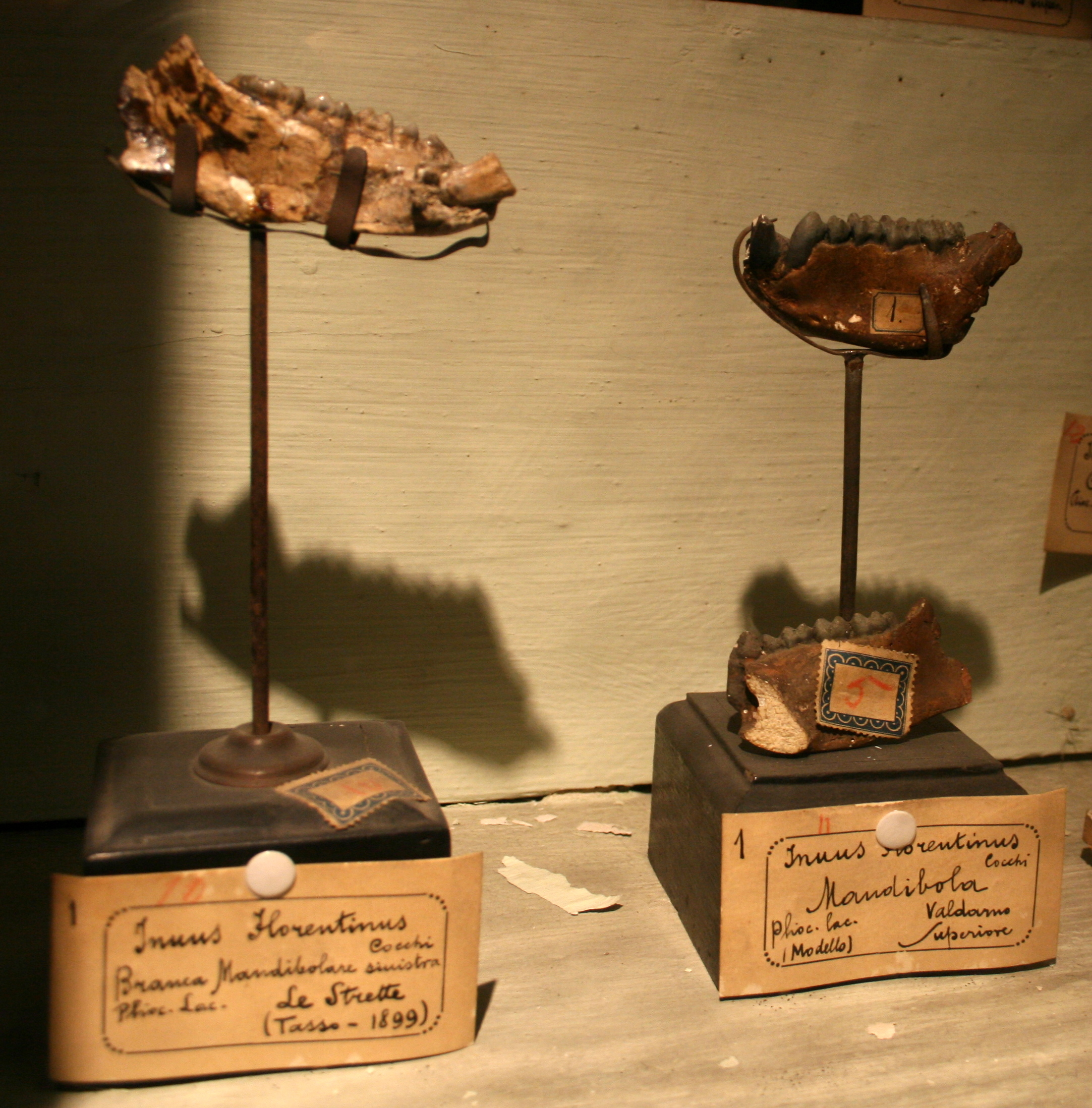 Museo Paleontologico di Montevarchi - Macaca florentina